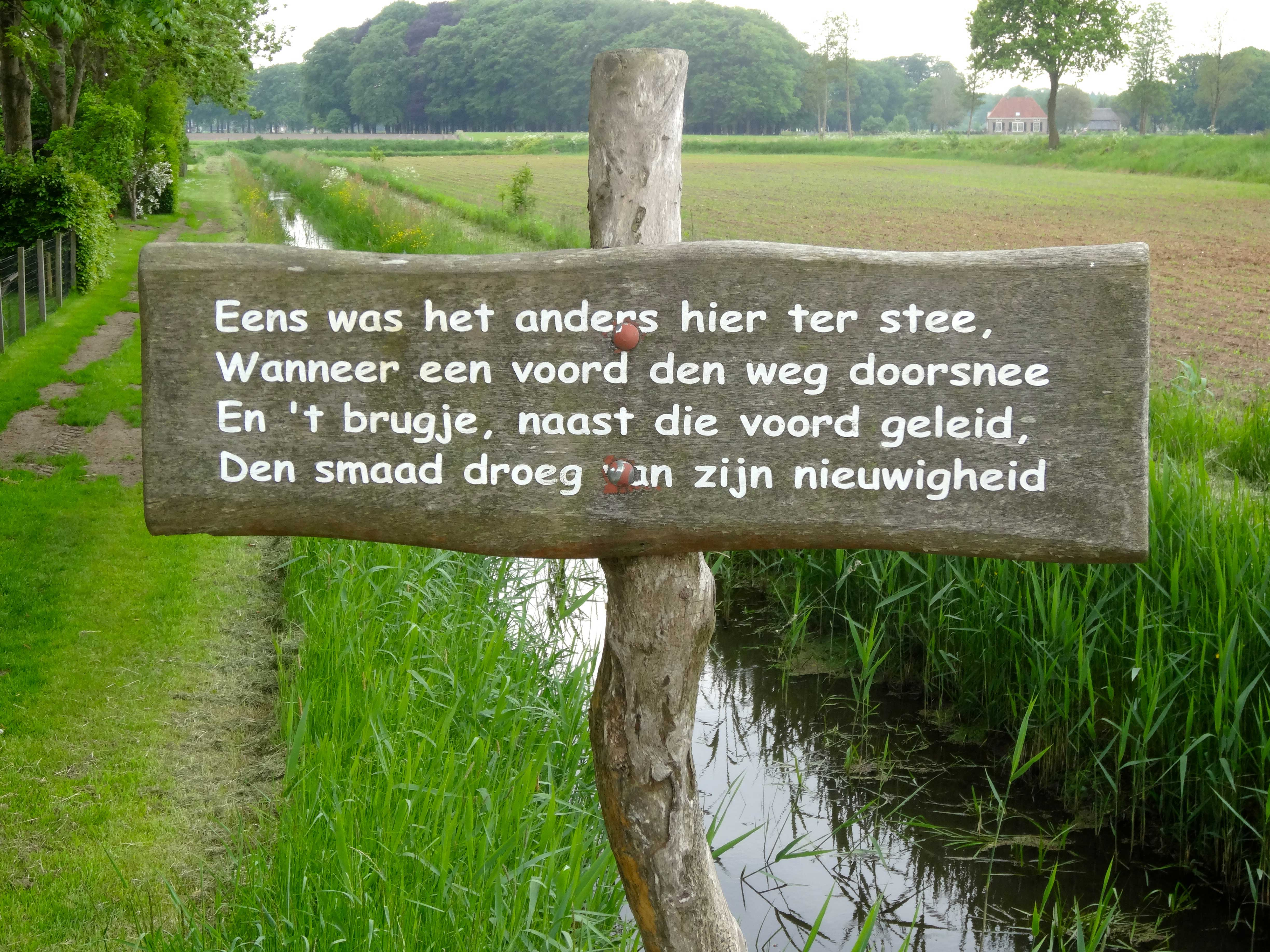 Strofe uit het gedicht "De hoofdige boer" van Staring nabij Almen